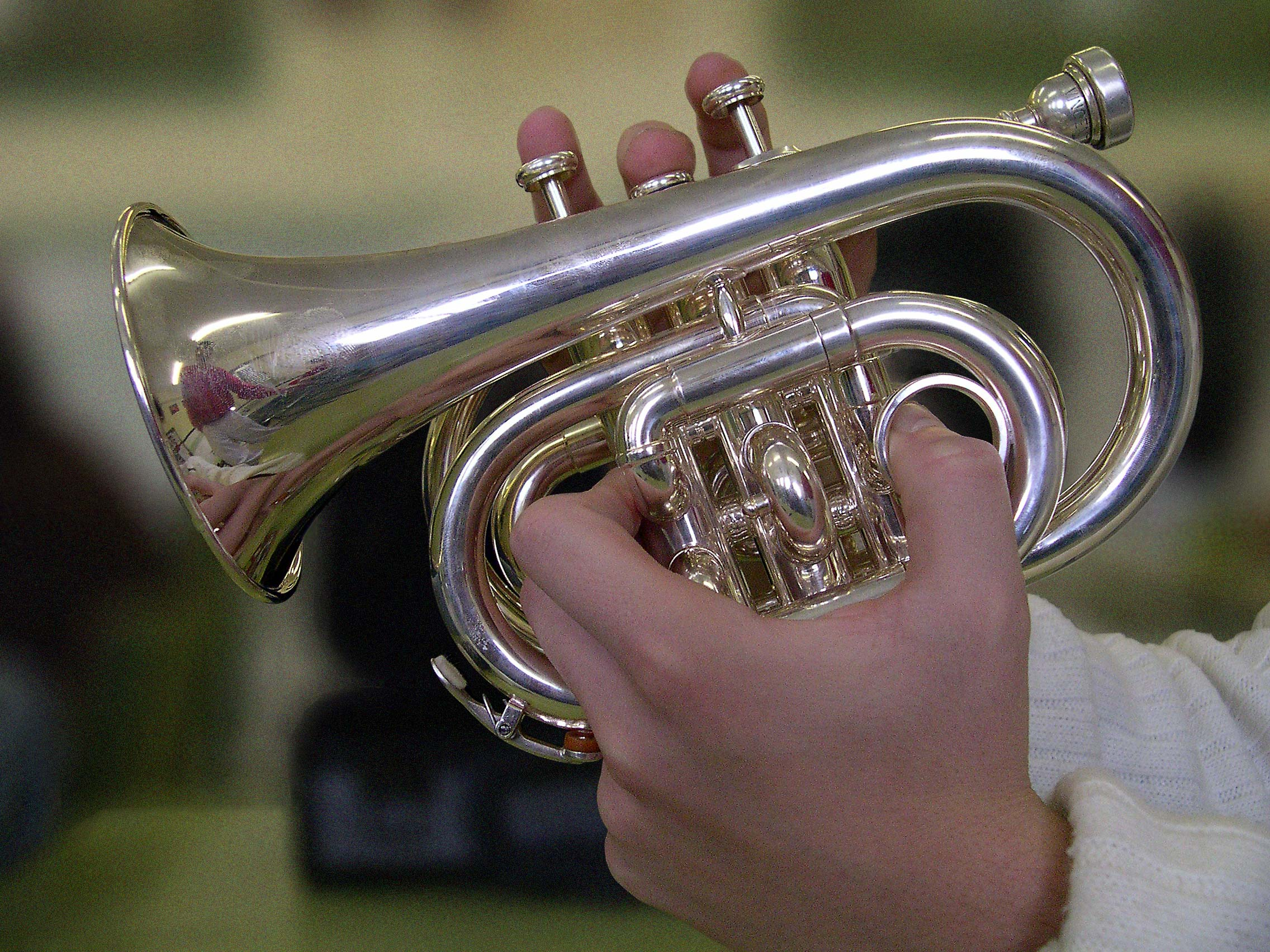 La trompeta pocket o trompeta de bolsillo es un instrumento de la familia de viento-metal con boquilla